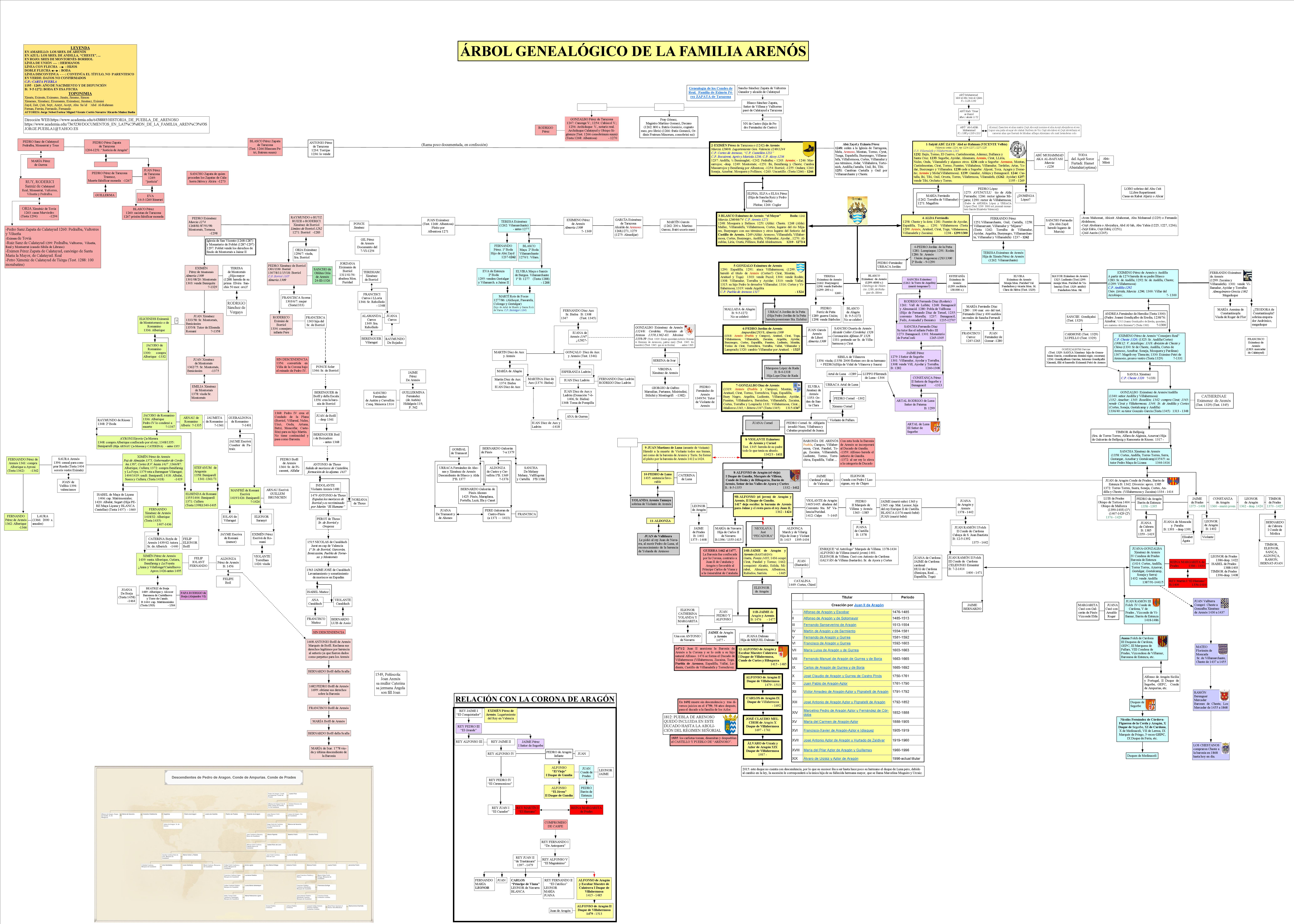 Arbre genealógic d´Alda Ferrandis i el seus familiars